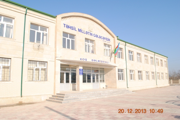 Ş.Məhərrəmov adına Qaravəlli kənd tam orta məktəbi